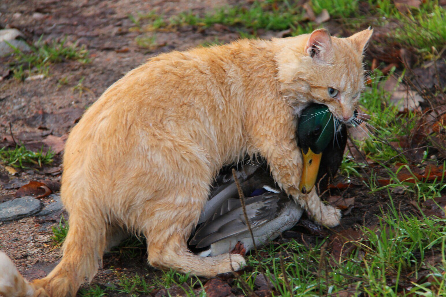 Валдайский: Национальный парк находится в северной части Валдайской возвышенности, протяженность его с севера на юг — 105 км, с запада на восток — 45 км. Границы Парка приблизительно соответствуют границам водосборных бассейнов озер Боровно, Валдайское, Велье, Селигер и верховьев реки Полометь, Валдайский район, Новгородская область This image is related to the protected area of Russia number 5300047